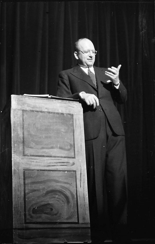 Kabarett der Komiker: Werner Finck am Katheder